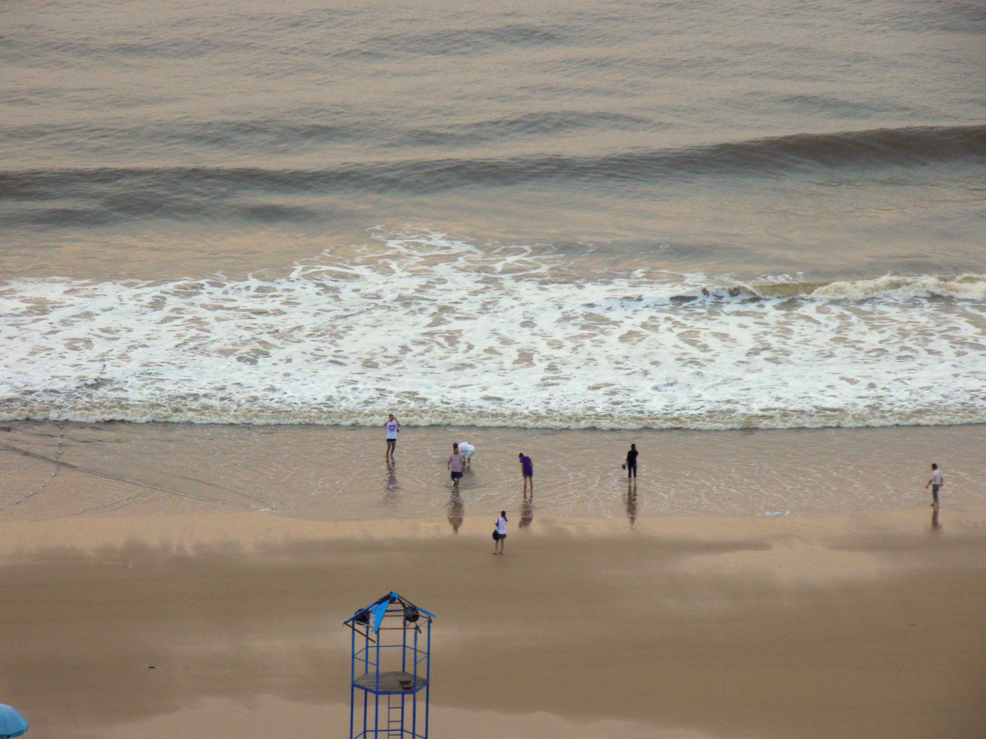 中文（中国大陆）: yangjiang